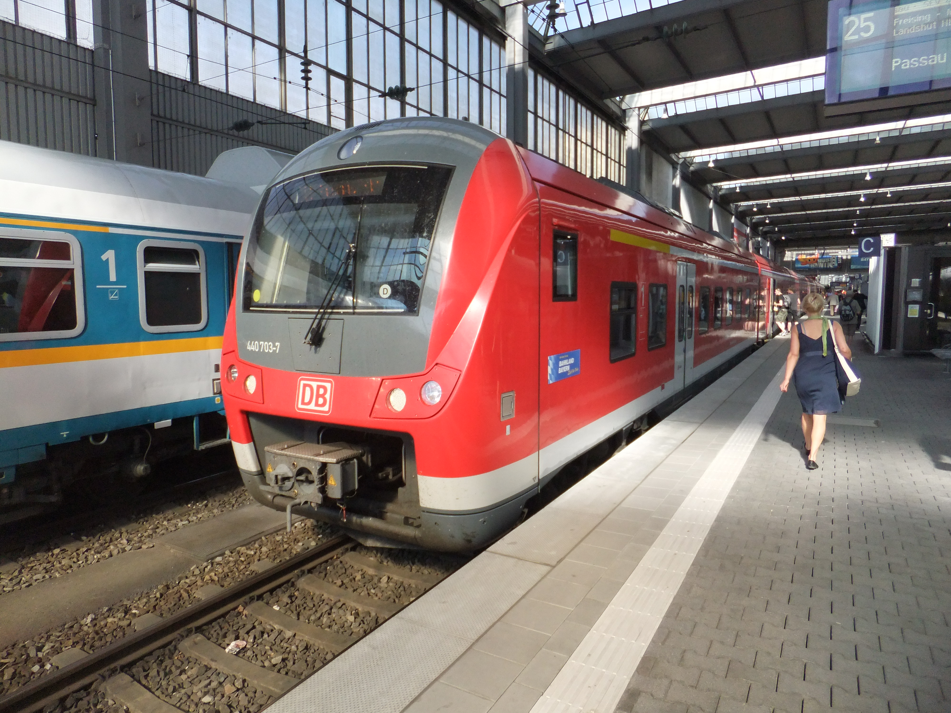 DBAG-Baureihe 440 (Alstom Coradia Continental) als Donau-Isar-Express im Münchener Hauptbahnhof